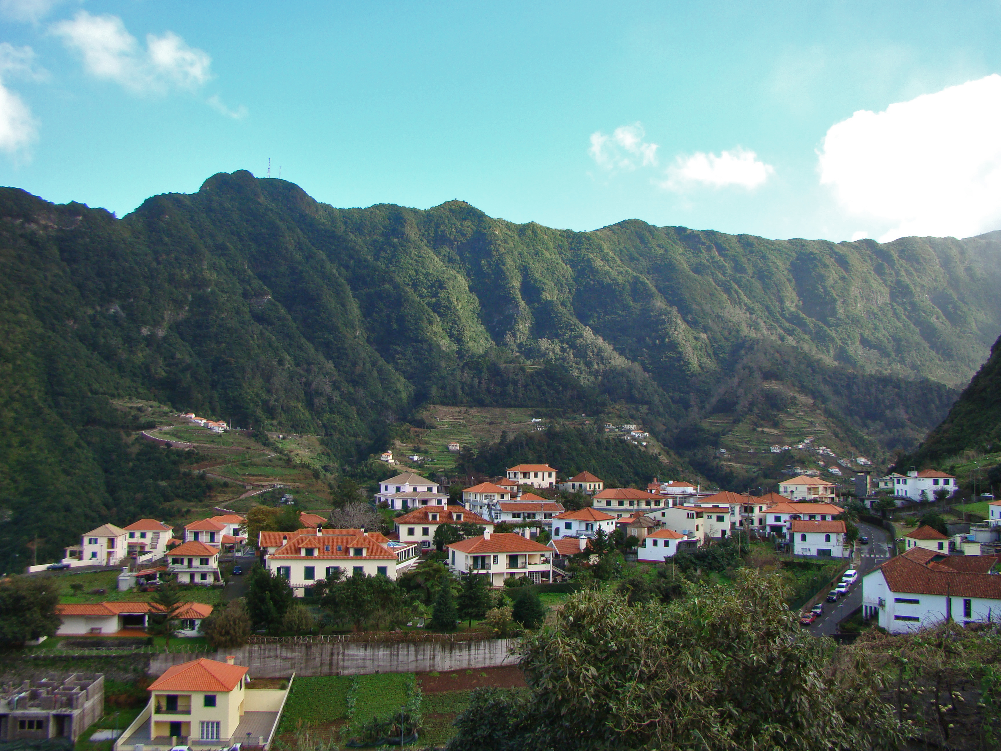 Vista de Boaventura, São Vicente